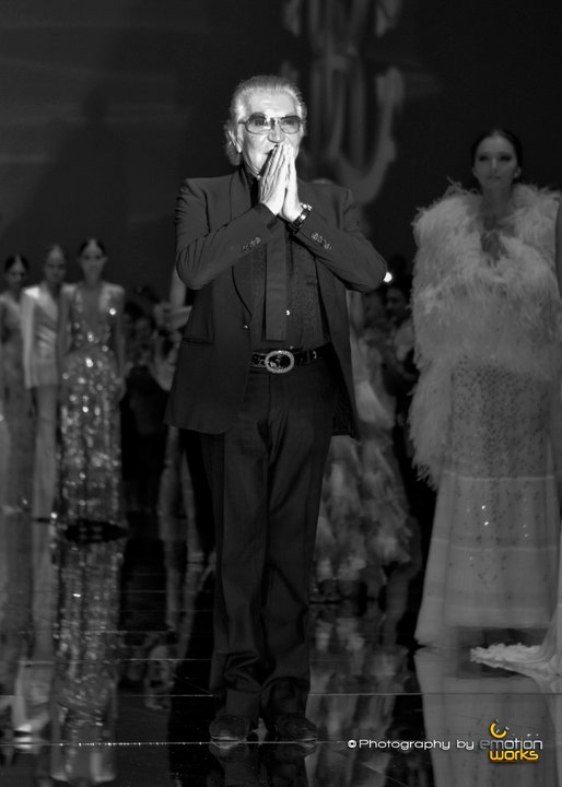 Cierre de la Pasarela de Roberto Cavalli - Cali Exposhow 2010